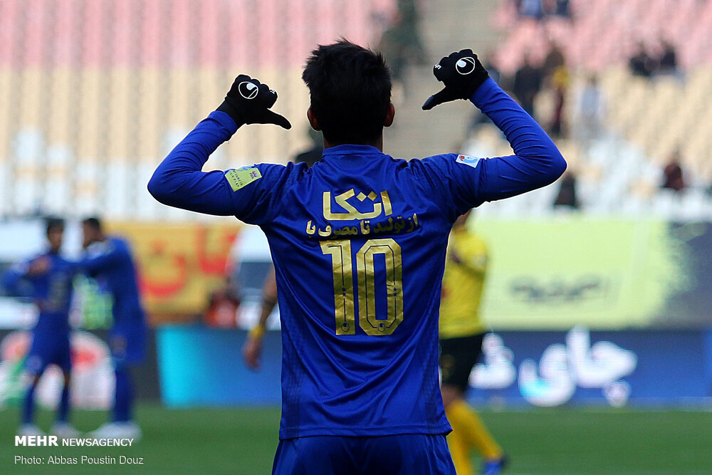 بازی دو تیم سپاهان و استقلال در ۹ آذر ۱۳۹۸ در ورزشگاه نقش جهان اصفهان که سپاهان توانست با گل ثانیه‌های پایانی نورافکن استقلال را با نتیجه ۲-۲ متوقف کند. (گزارش کامل بازی)